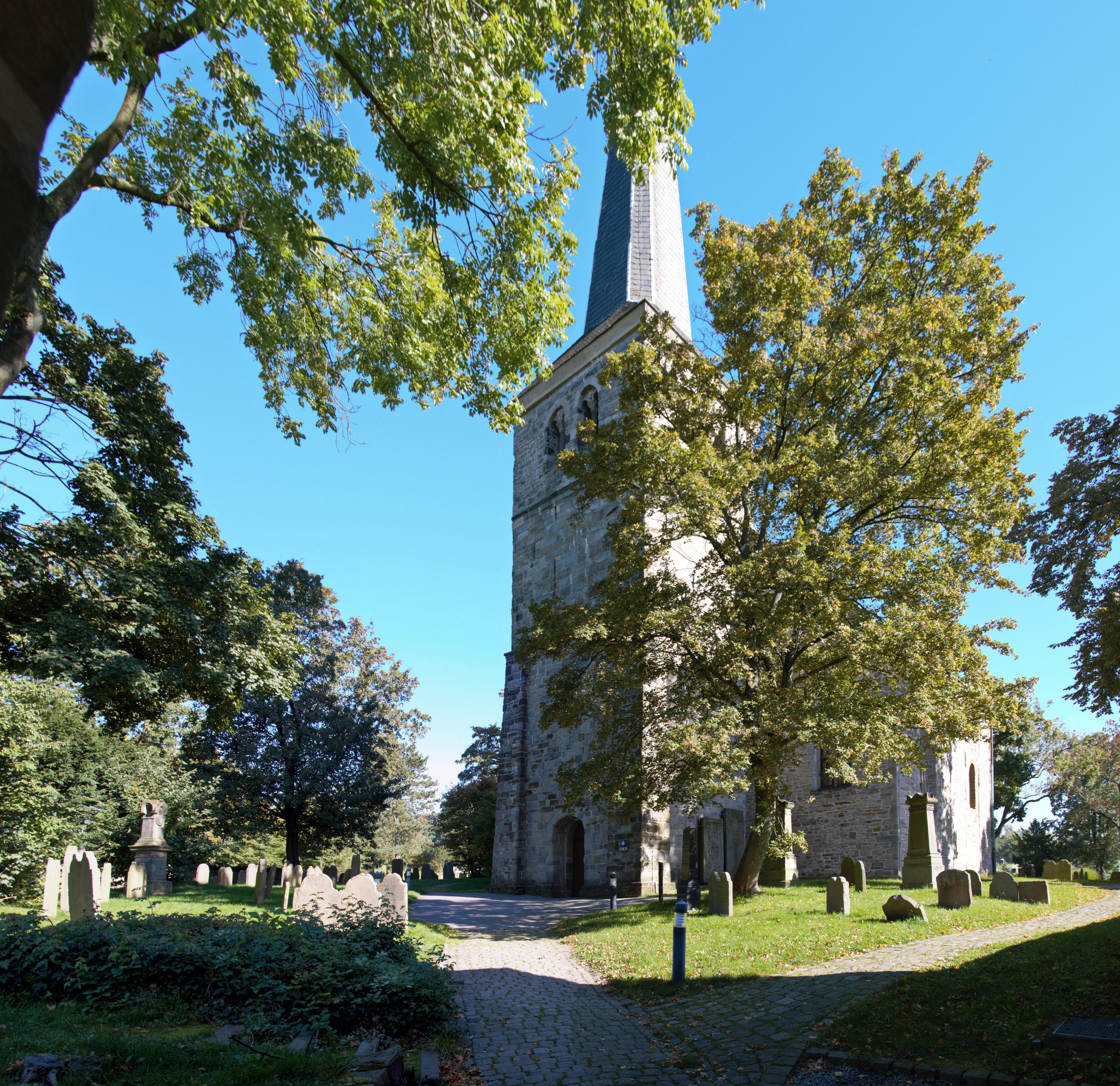 Dorfkirche Bochum-Stiepel, Brockhauser Str. 72